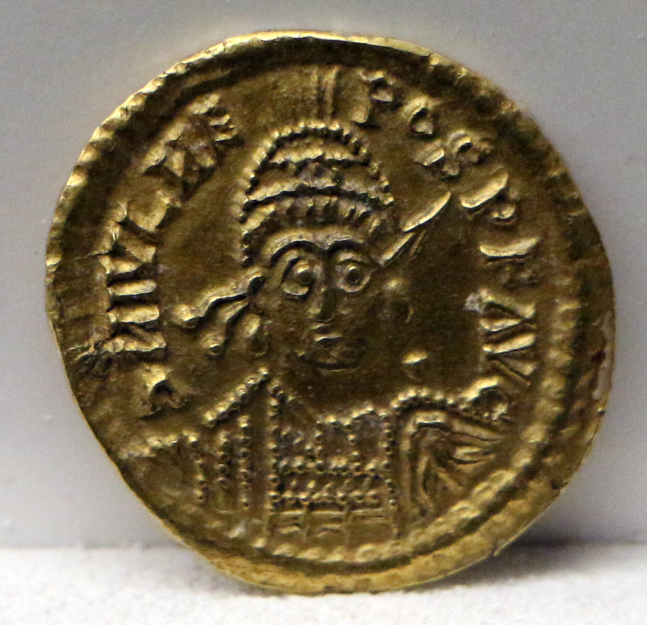 Museo Archeologico Nazionale di Aquileia This is a photo of a monument which is part of cultural heritage of Italy.